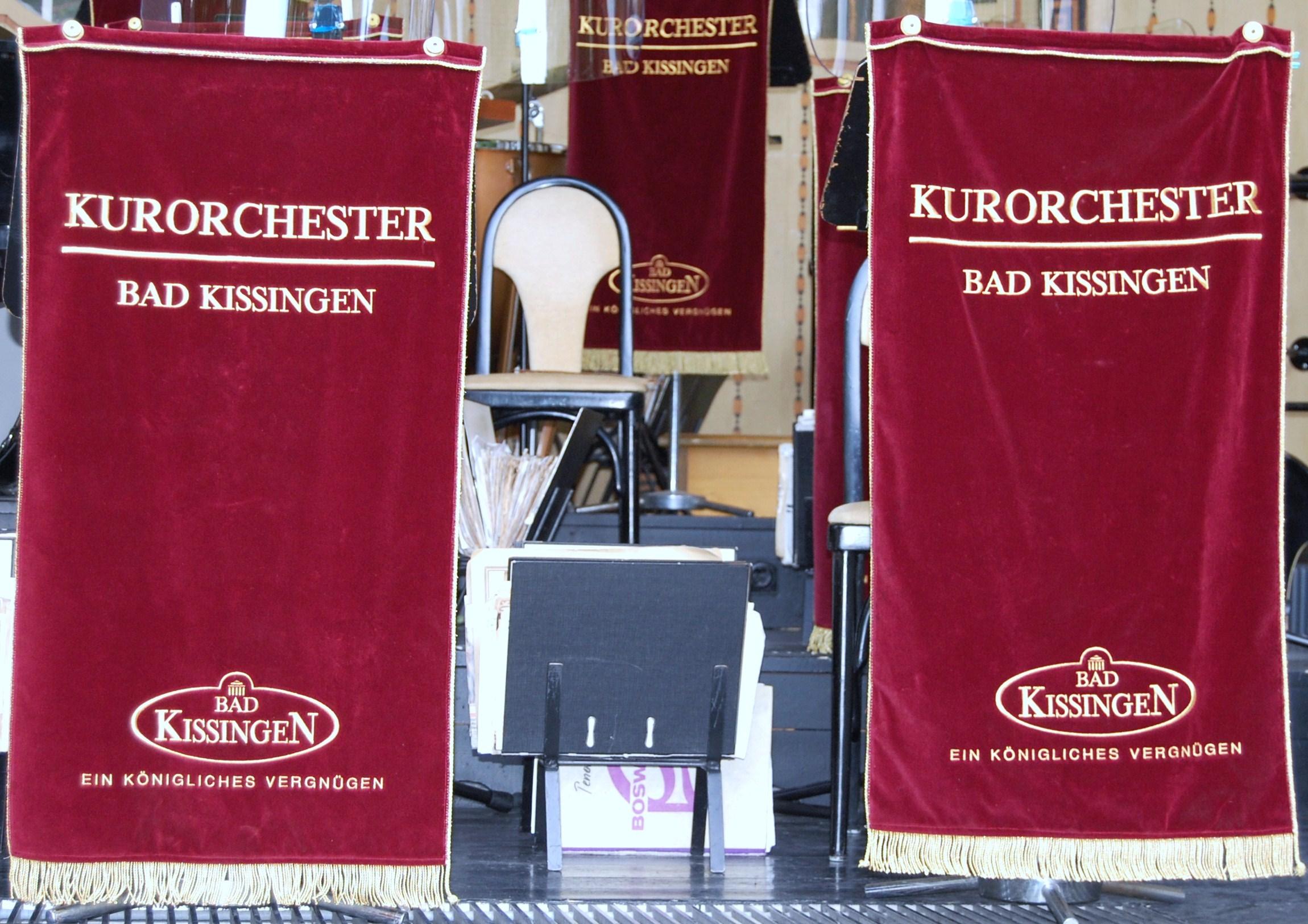 Verdeckte Notenständer: Bad Kissinger Kurorchester